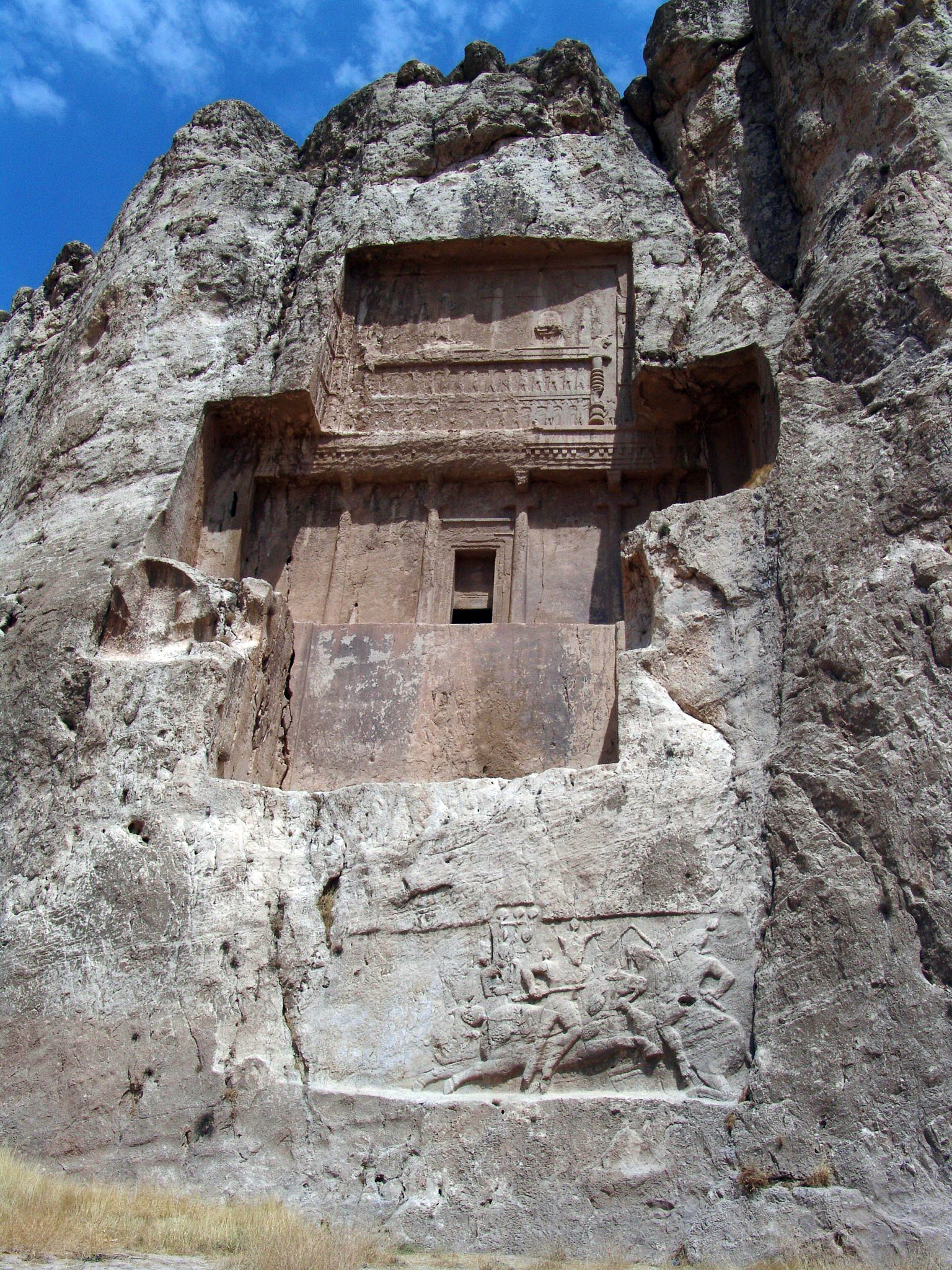 آرامگاه داریوش دوم در نقش رستم